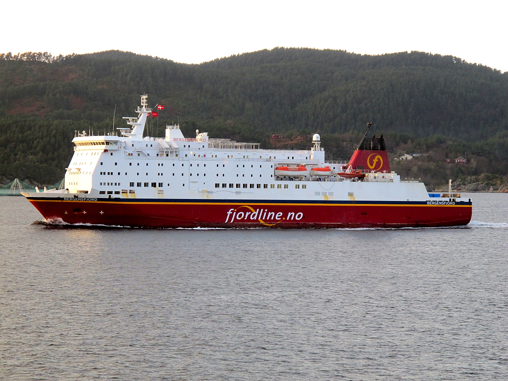 Fjord Line ferry 'Bergensfjord'